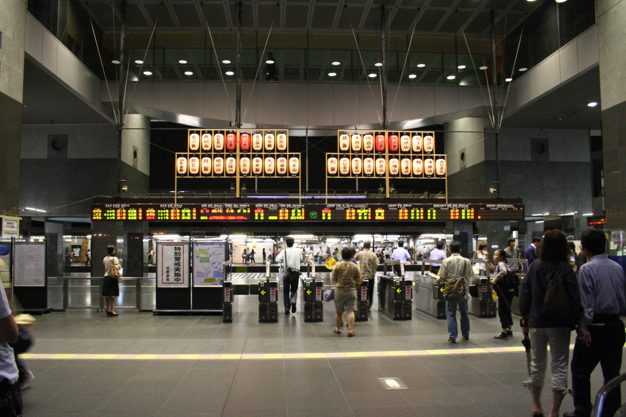 京都駅烏丸中央改札口。